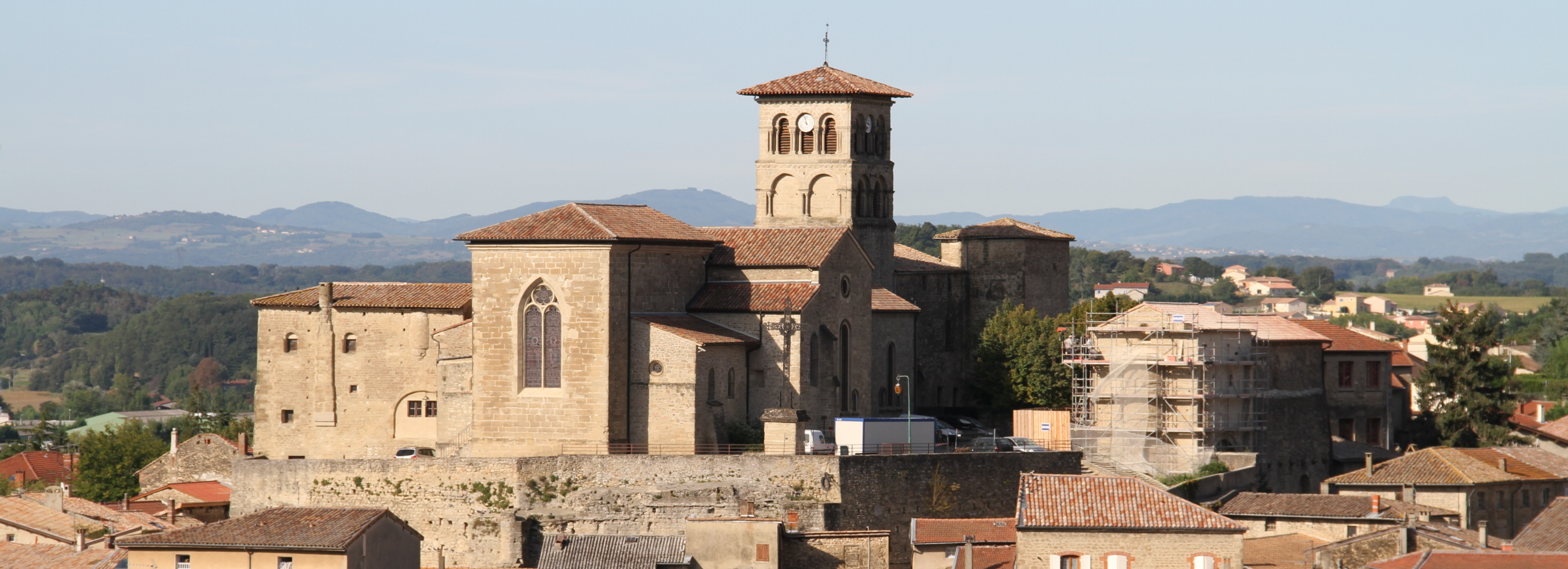 Ensemble monastique de Saint-Donat sur l'Herbasse : on distingue (de gauche à droite) le palais delphinal, la collégiale et son clocher et la chapelle (en phase de restauration) This building is en partie classé, en partie inscrit au titre des Monuments Historiques. It is indexed in the Base Mérimée, a database of architectural heritage maintained by the French Ministry of Culture, under the references PA00117049 and PA00117048 .